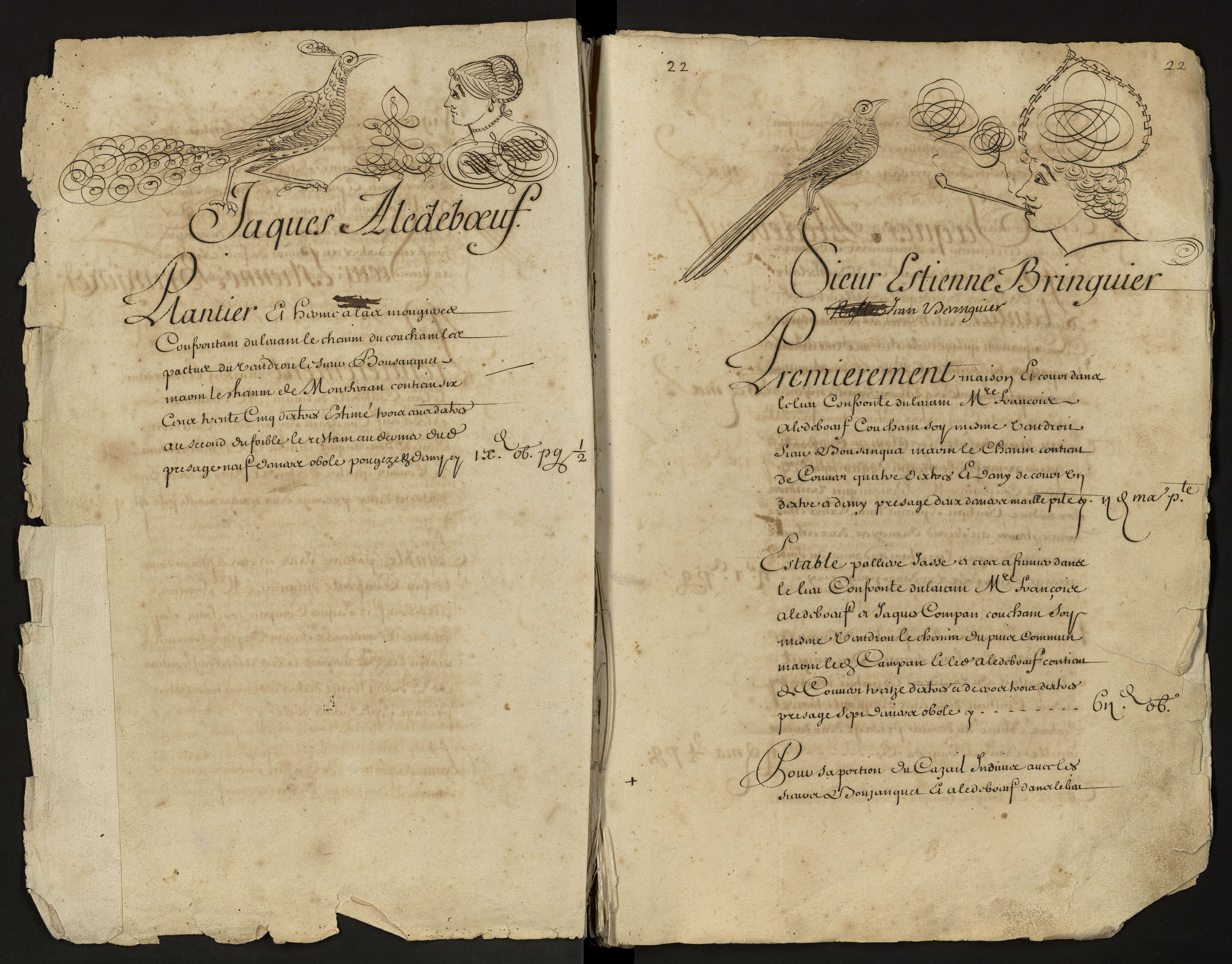 Guarrigues. - Usuel du compoix de 1683